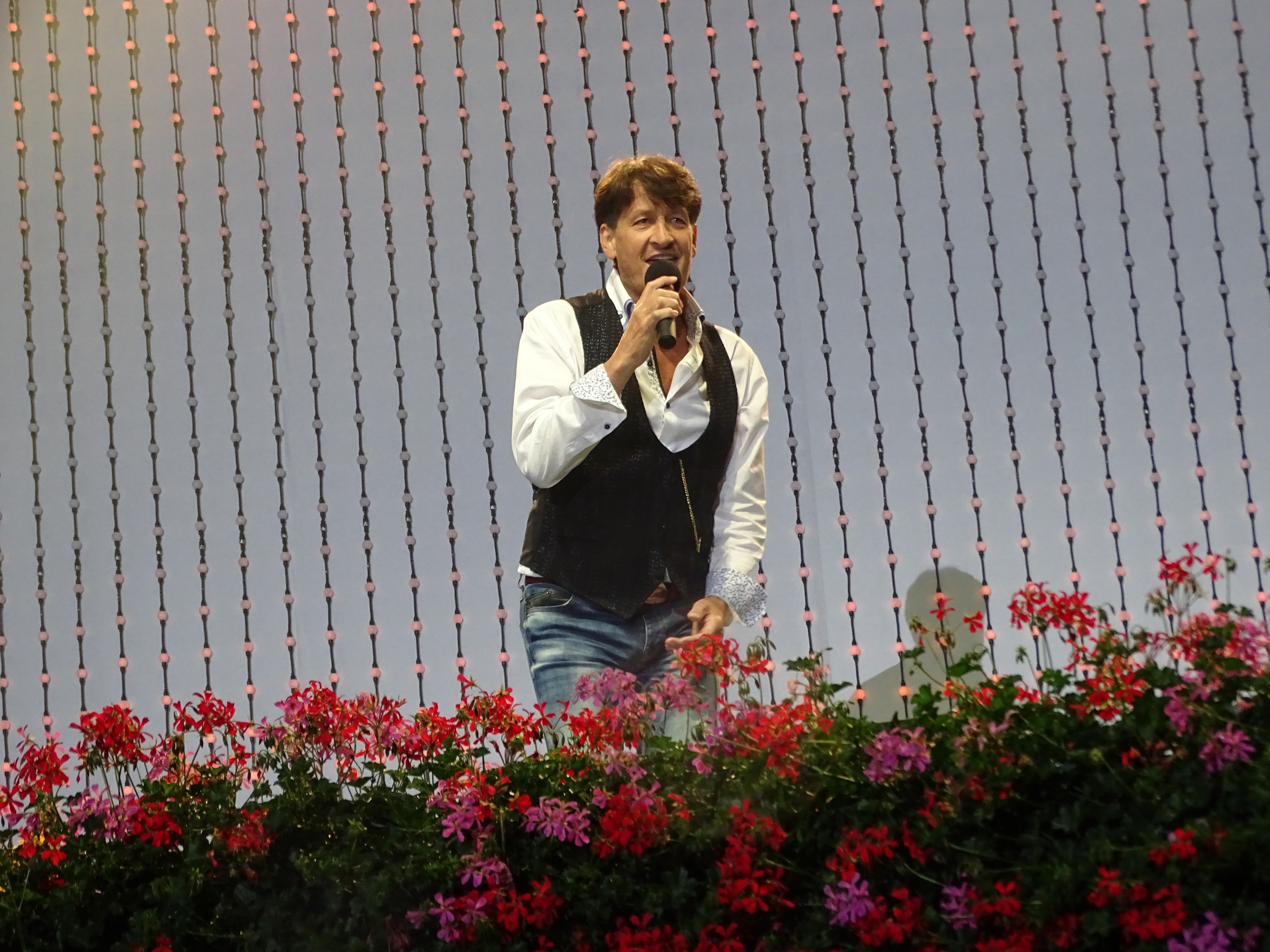 Das Foto habe ich anlaesslich des letzten Live Auftritts von Andreas Fulterer im Juli 2016 in Bad Fuessing aufgenommen. Alle Rechte liegen bei mir.